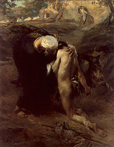 Edouard Monchablon, Le retour de l'enfant prodigue, 1903, Paris, ENSBA